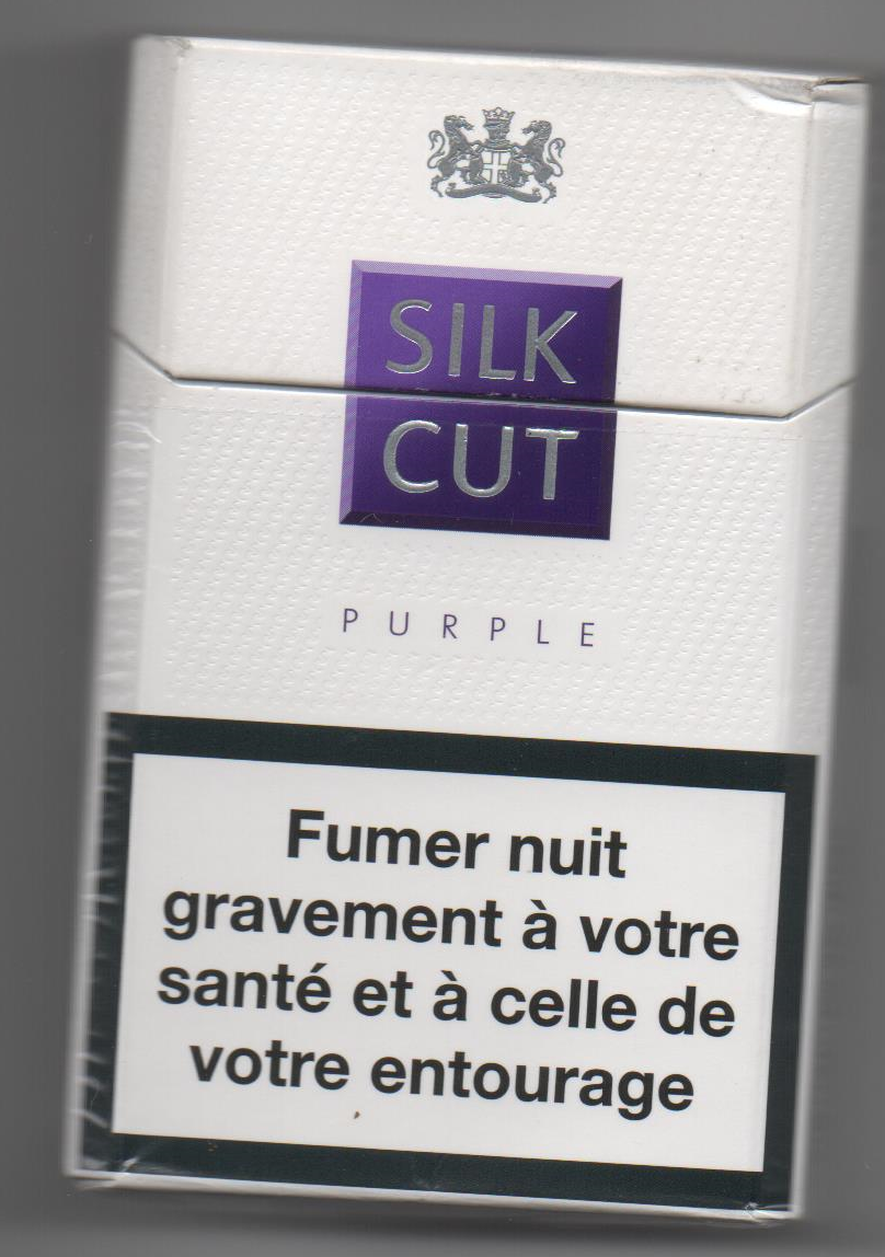 Paquet de 20 cigarettes Silk Cut Purple vendu en France avec indication de santé.